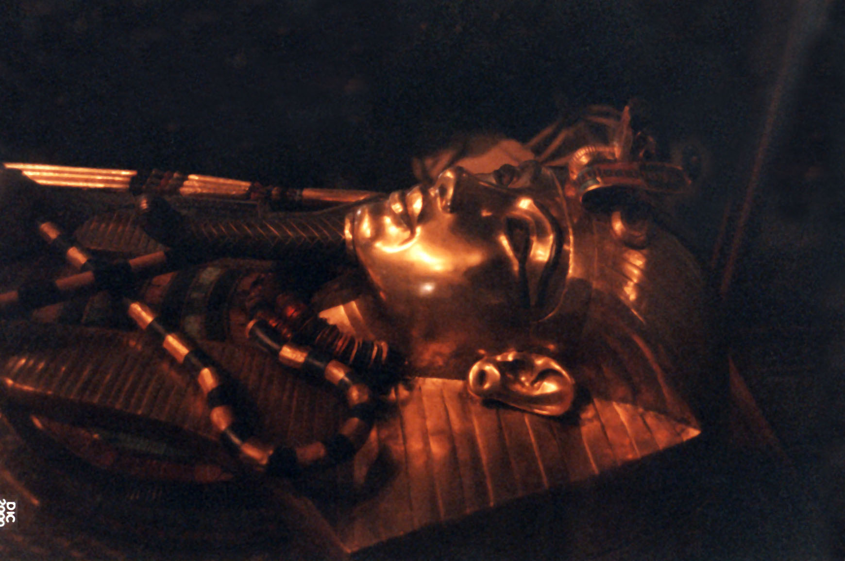 Autore: Hotepibre (Giuseppe); Località e data: il Cairo, Museo Egizio, dicembre 2000; Soggetto: il terzo sarcofago in oro massiccio di Tutankhamon (dalla tomba KV62 della Valle dei Re)